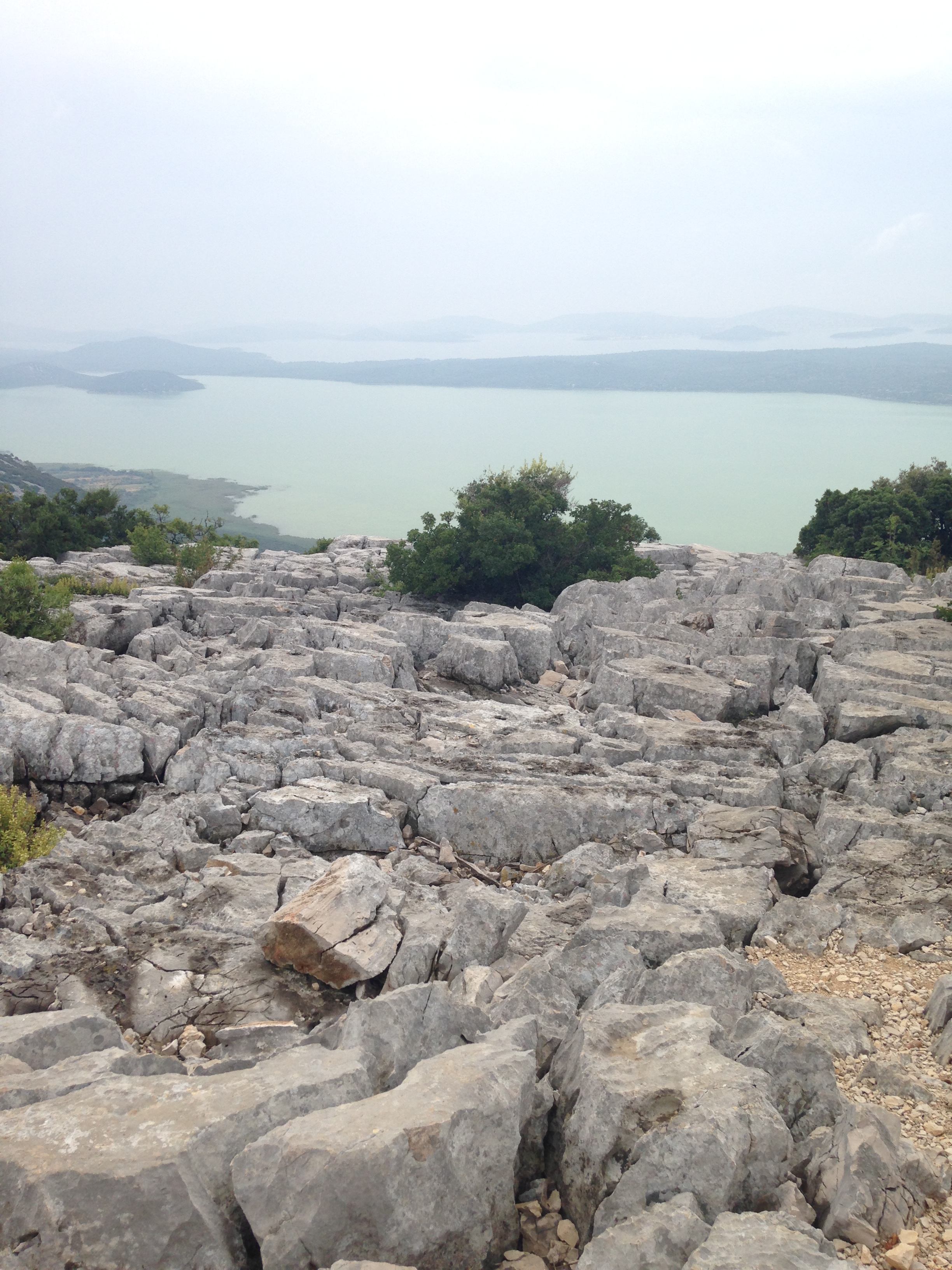 Park prirode Vransko jezero se nalazi u Hrvatskoj, Dalmacija između između povijesnih gradova Šibenika i Zadra.U neposrednoj je blizini jadranske obale a najveće je prirodno jezero u Hrvatskoj. Jedno je od rijetkih prirodnih staništa ptica vodarica te je 1999. g. progralašeno Parkom prirode. Park je velik 57 km2, a diči se Posebnim ornitološkim rezervatom koji je na listi važnih ornitoloških područja u Europi (Important Bird Areas in Europe). Uz park ovo pitomo podrućje nudi povijesno putovanje kroz predivnu prirodu kontinenta s mirisom mora. Park ima više ulaza, a ovo je pogled s Vidikovca na Kamenjaku.